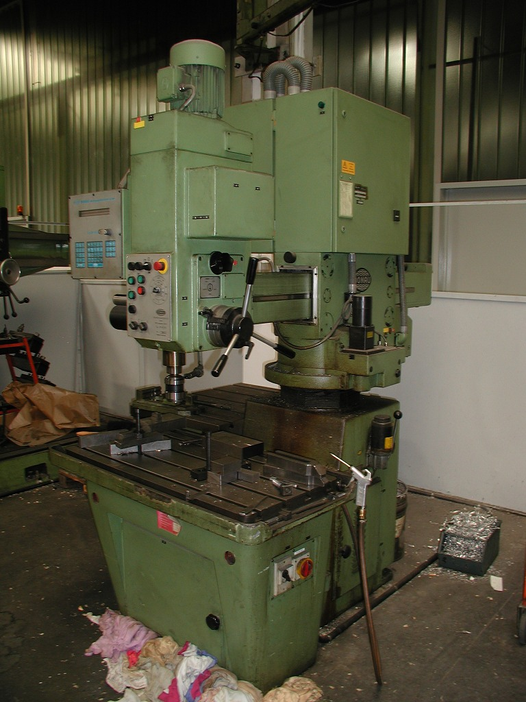 gemeinfrei-selbst fotografiert